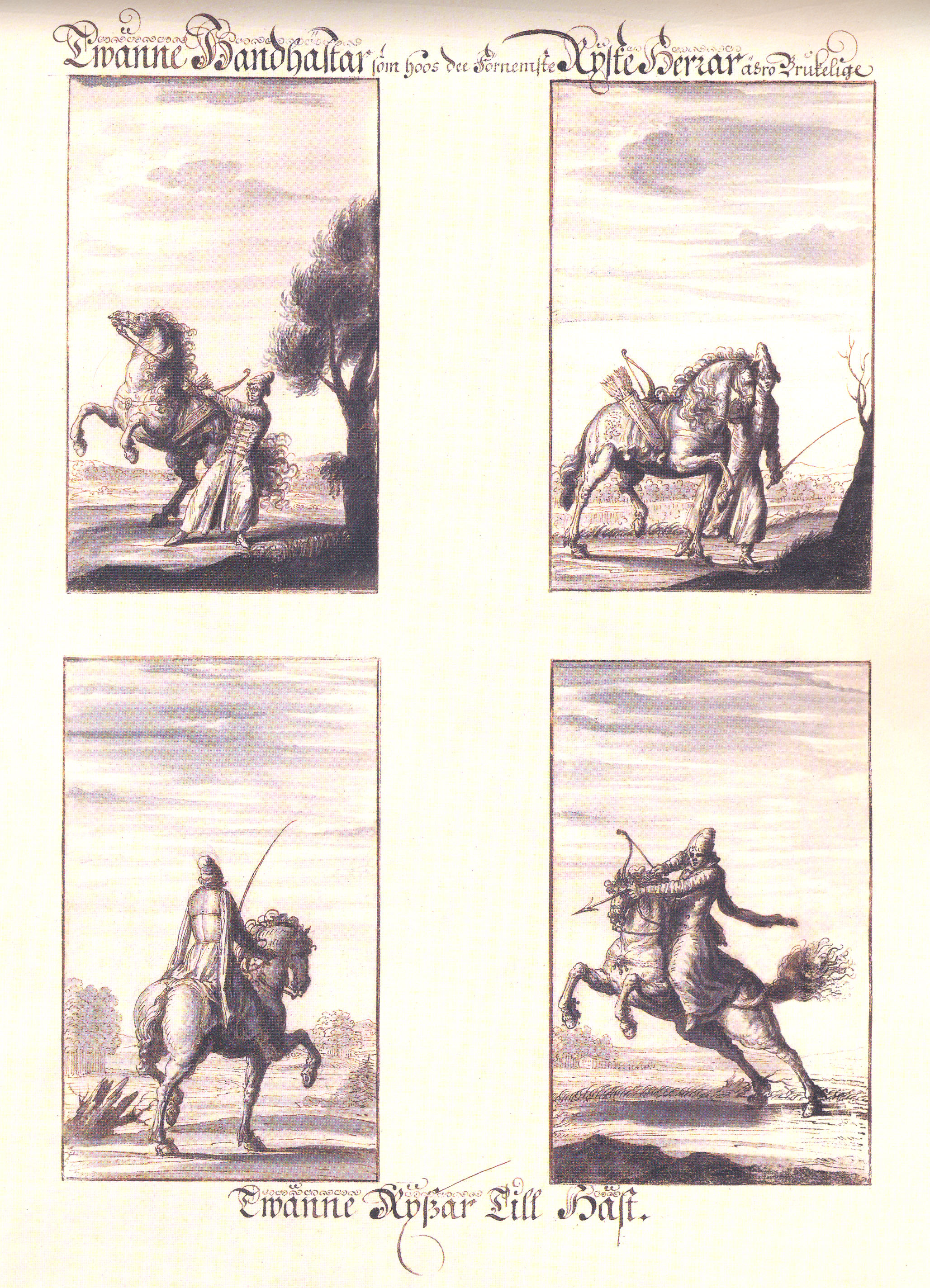 Две вьючных лошади знати. Два русских конника.